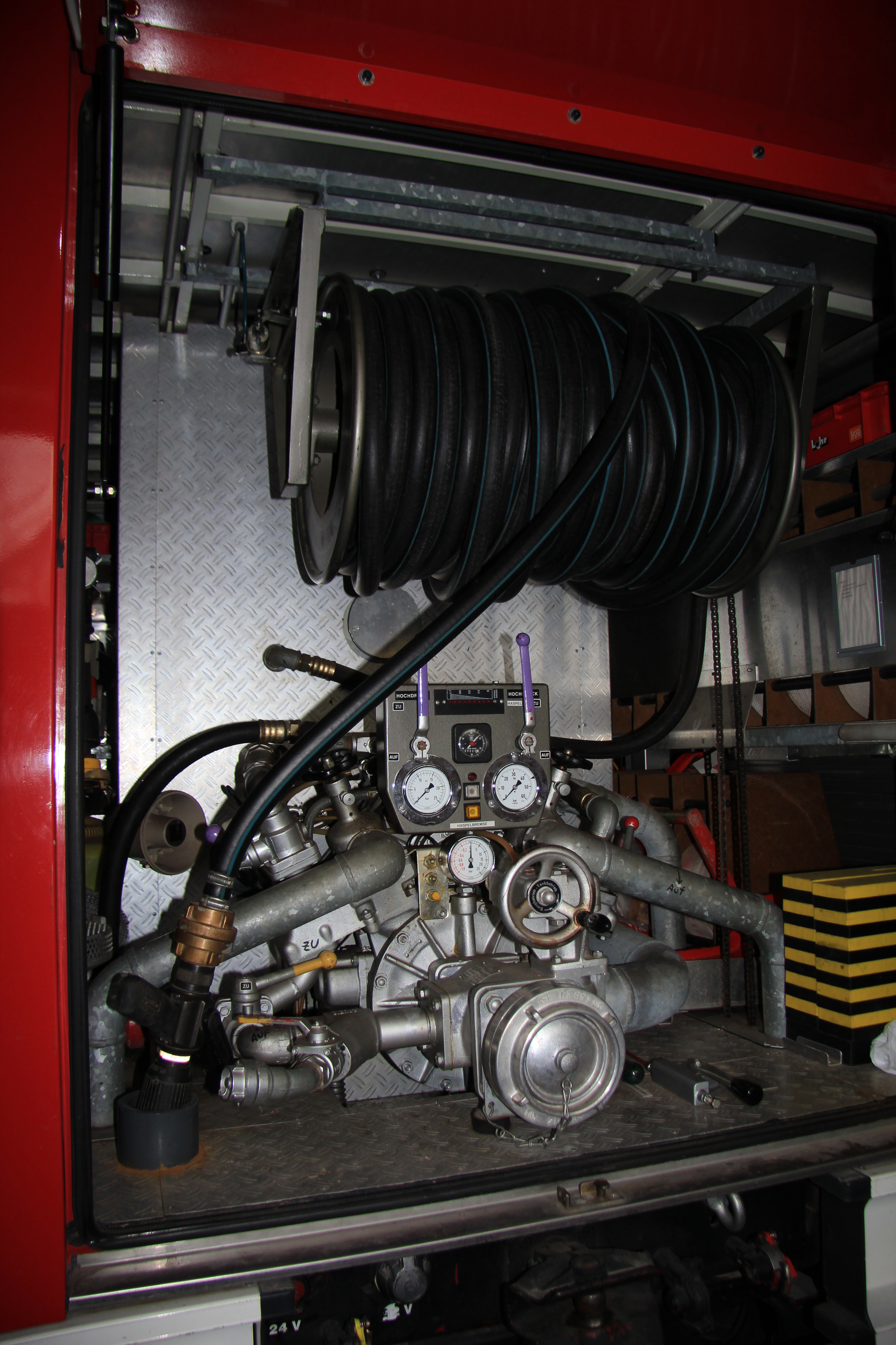 Ziegler-Feuerlöschpumpe mit Normal-und Hochdruck mit rein mechanischer Regelung darüber Hochdruckhaspel, Einbauort Niederösterreich, Baujahr 1987